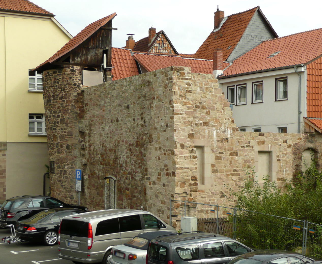 Stadtmauerrest an der Bremer Schlagd